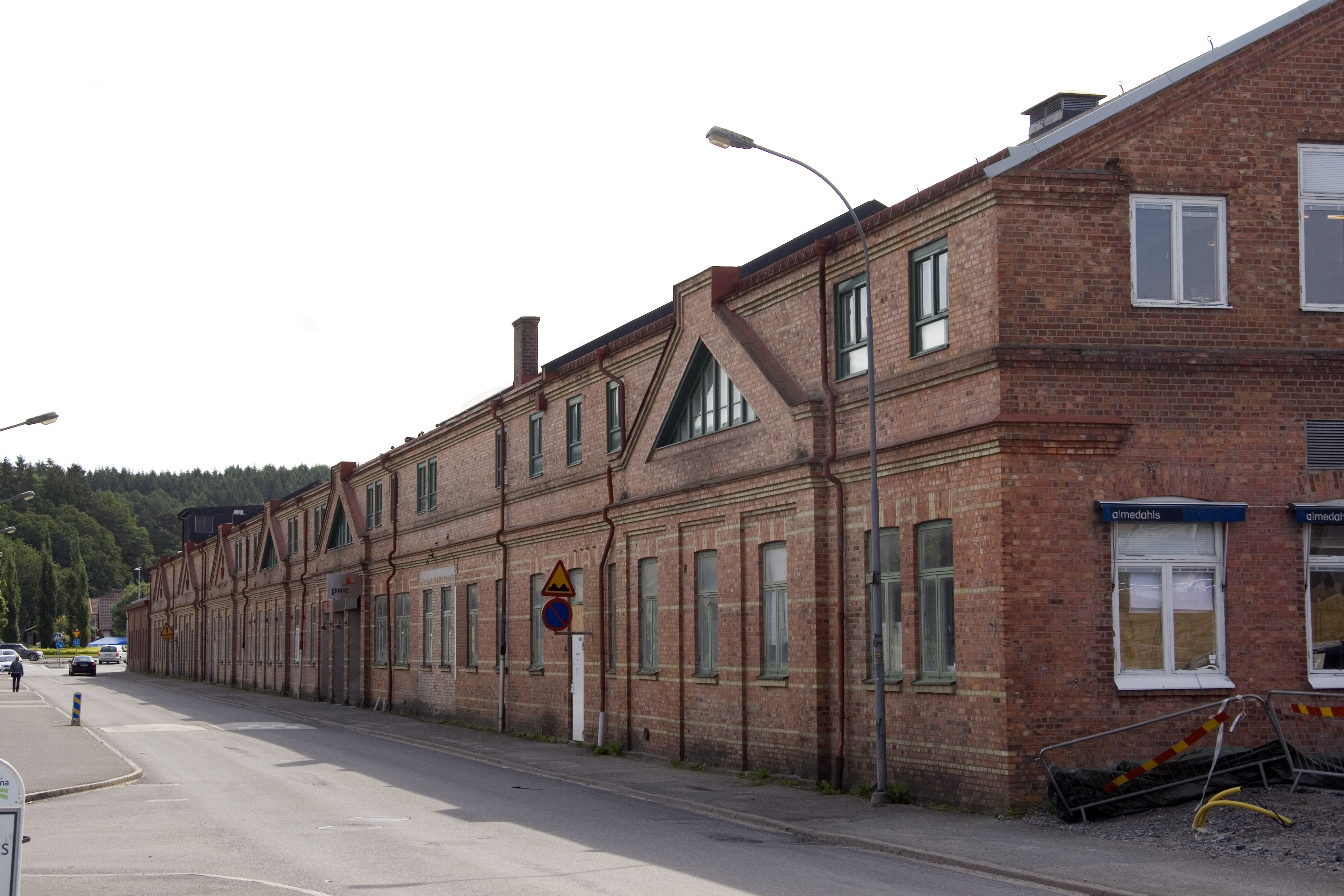 Fabriksbyggnad vid sjön Gerdsken, uppförd för Alingsås Bomullsväfveri AB. Fasad mot Hemvägen. Byggnaden påbörjades 1905-06 och utvidgades i etapper.